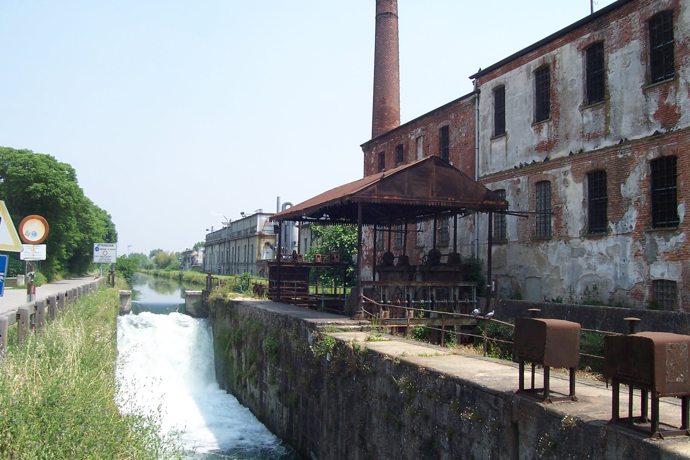 La Conca della Filanda di Rozzano (Milano)